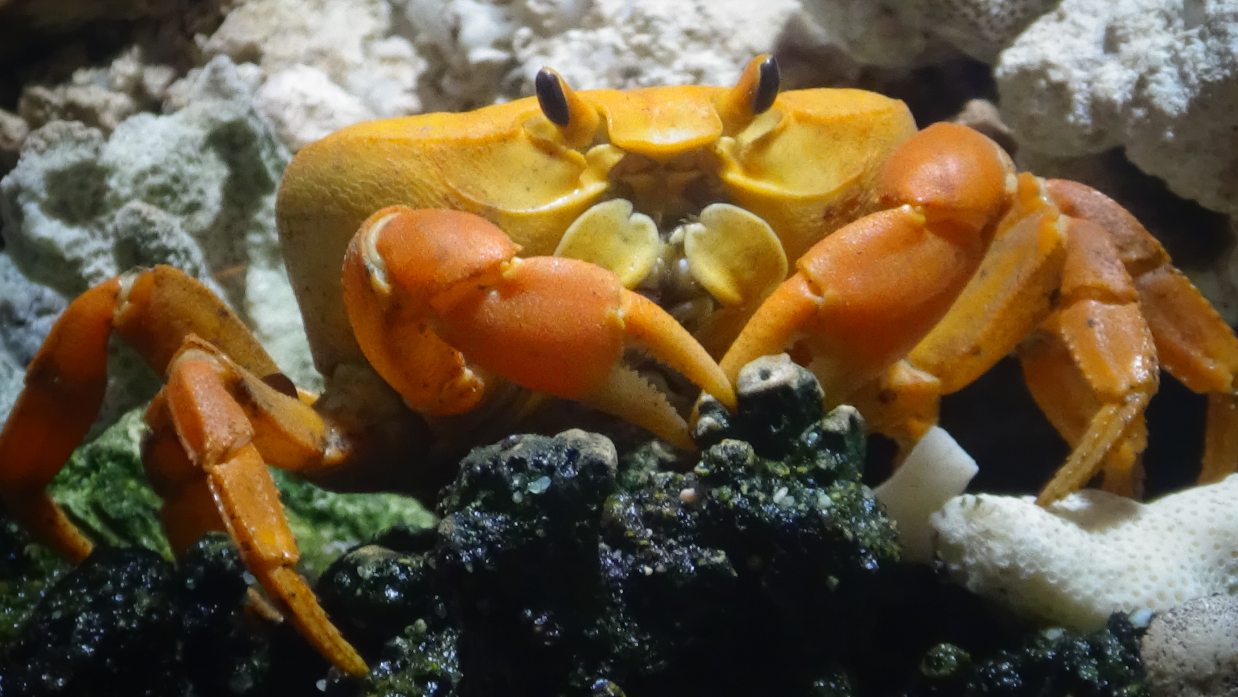 Gecarcinus johngarthia planatus - crabe de clipperton wiki14